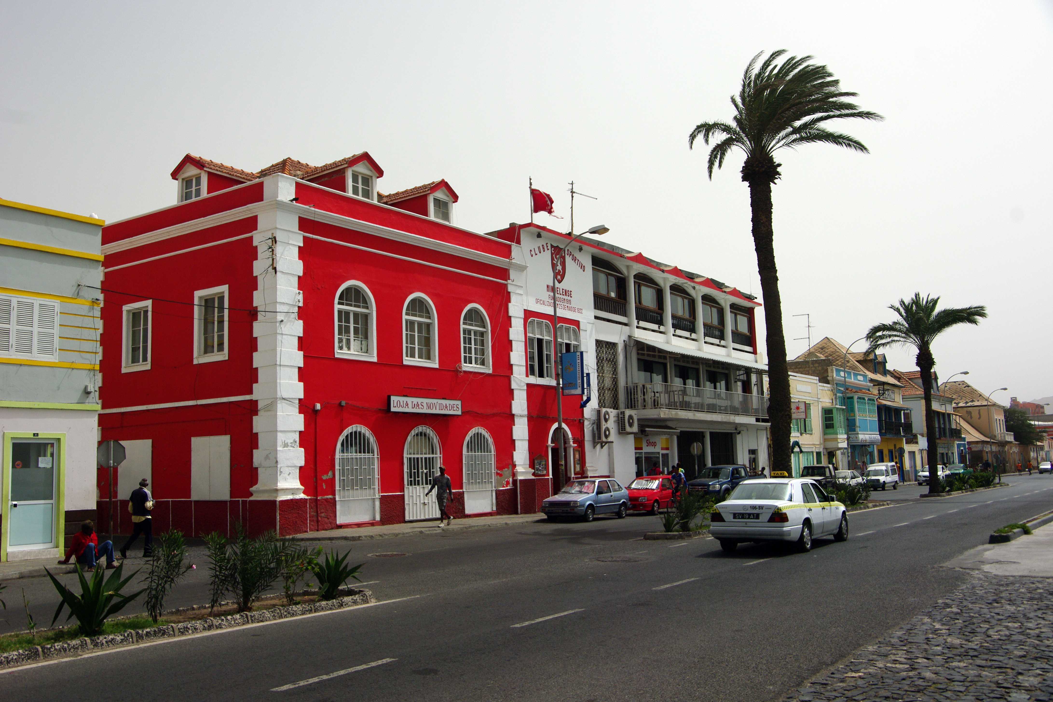 Uferstraße Mindelo